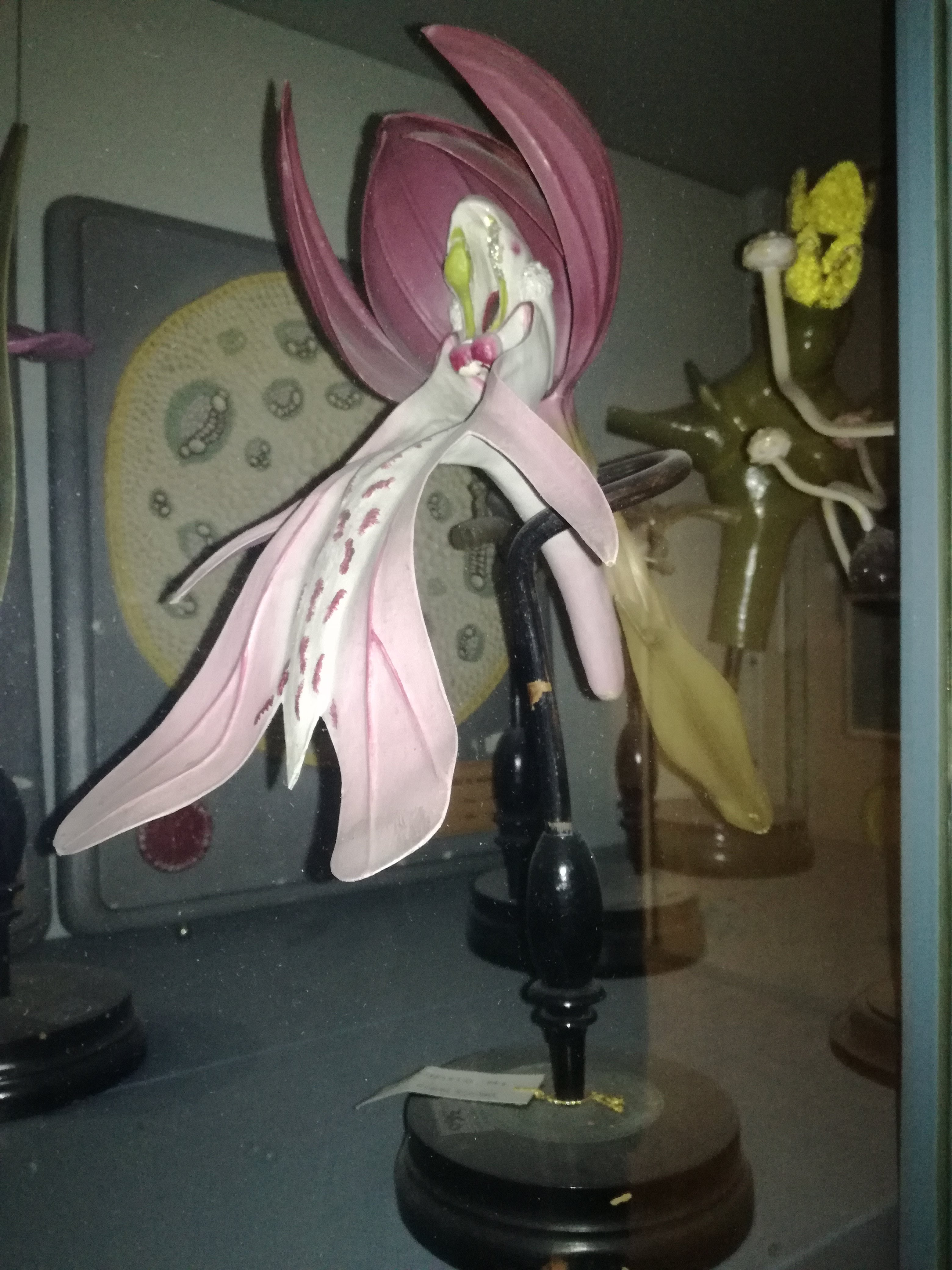 Modelli botanici della manifattura Brendel conservati al liceo ginnasio Dante di Firenze